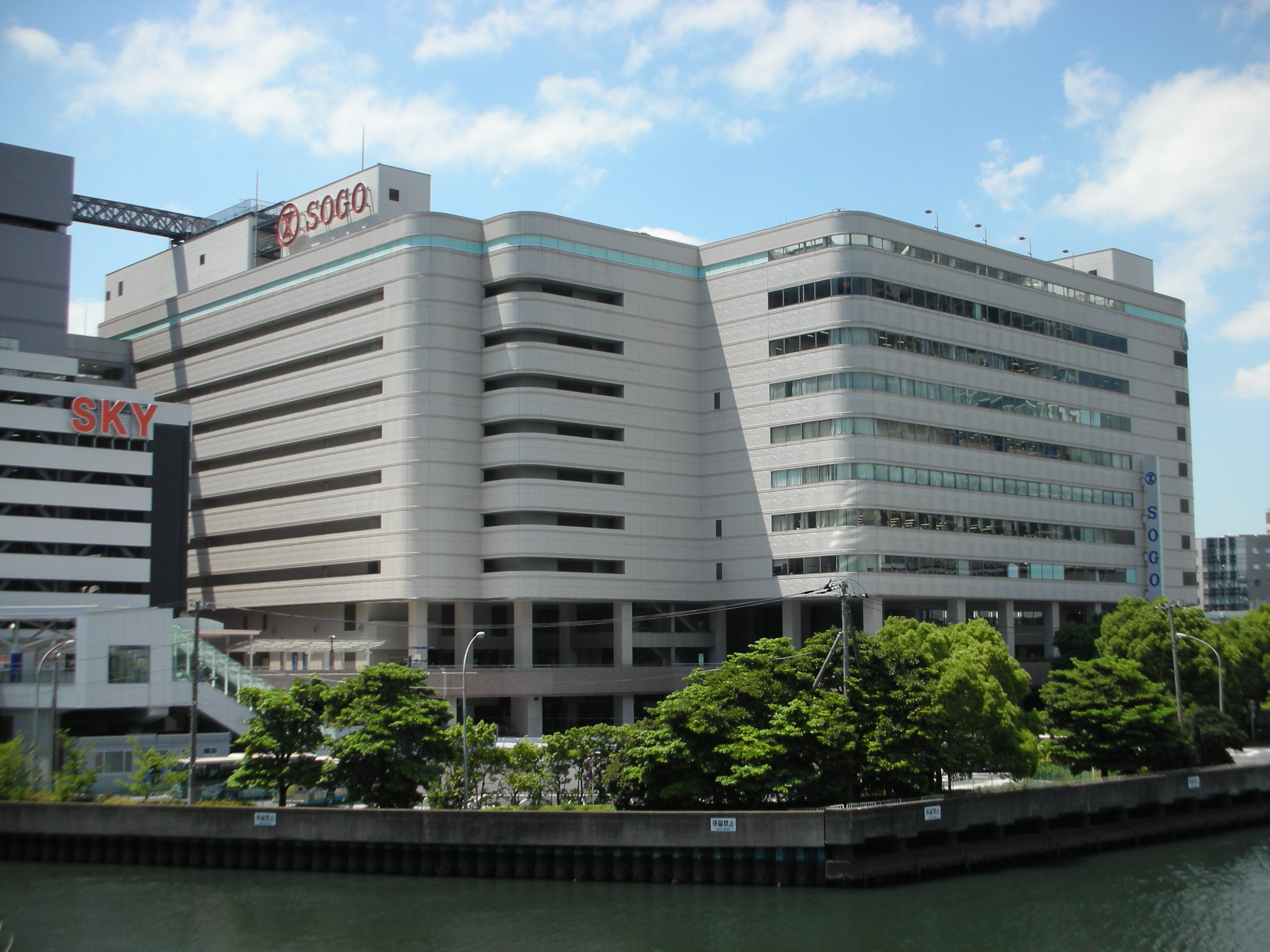 そごう横浜店の外観